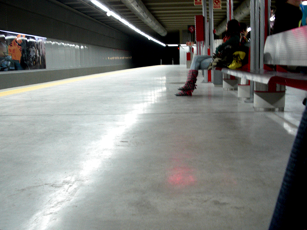 Y de regionales, que es lo que interesa :)